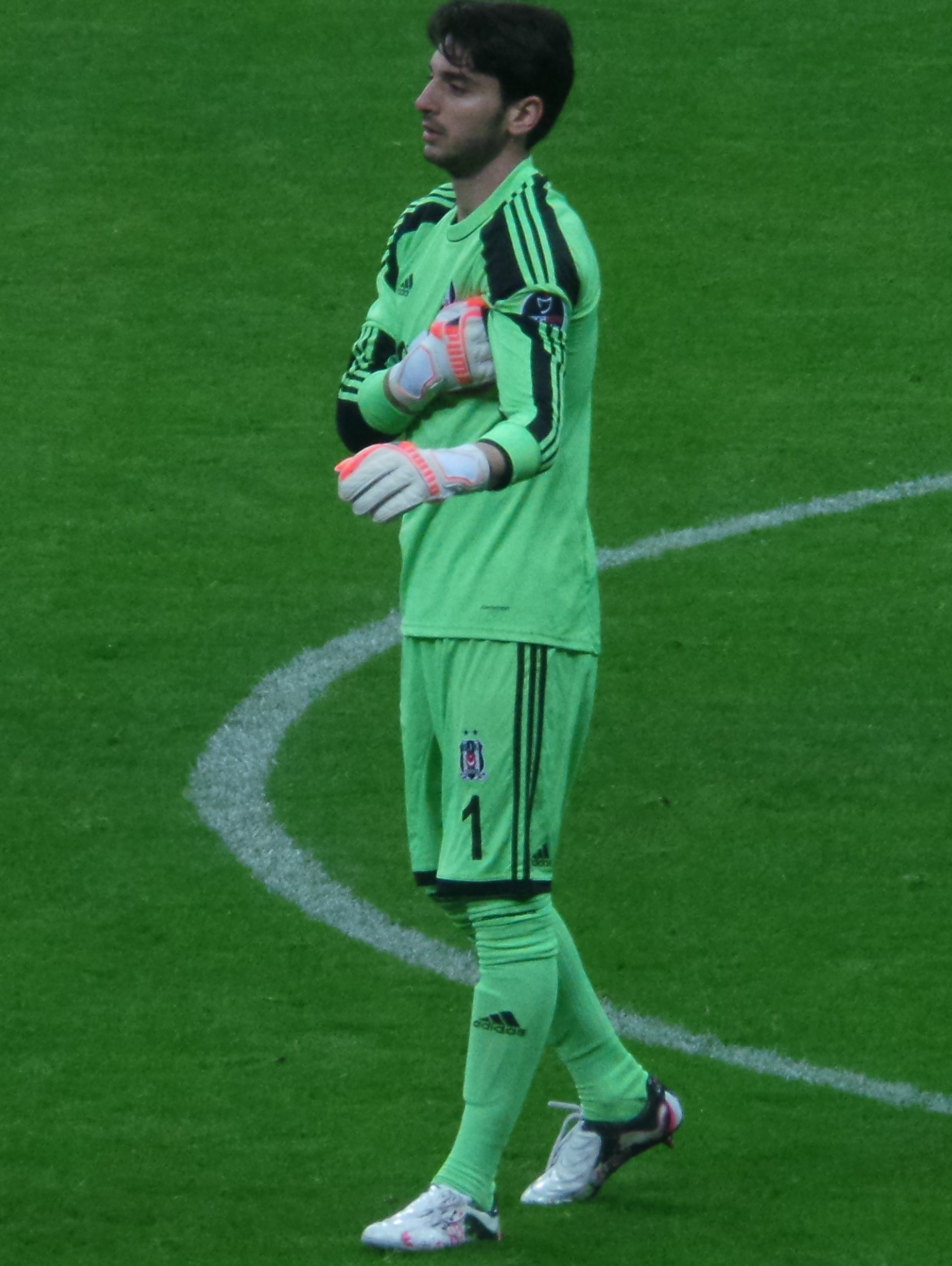 Cenk Gönen